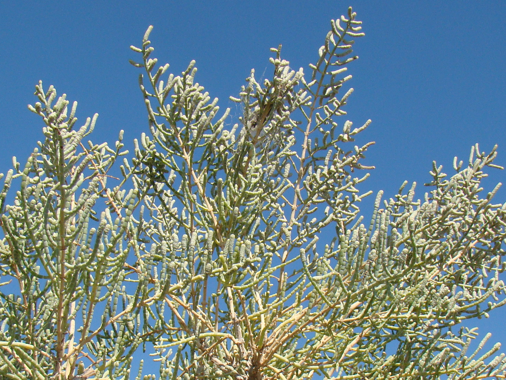 Соляноколосник прикаспийский (Halostachys caspica). Окрестности города Байконур, Казахстан.